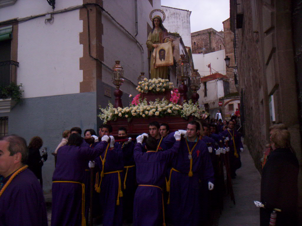 El Paso de la Verónica en la calle Godoy